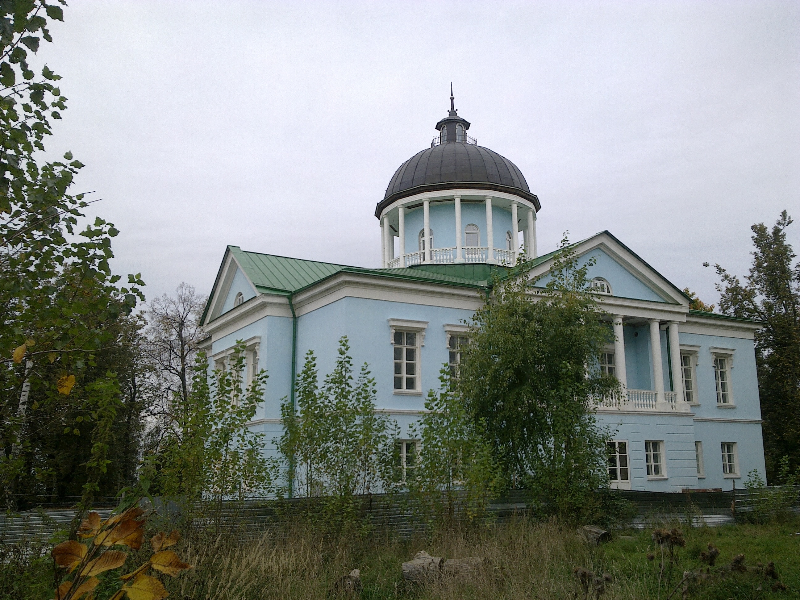 Усадьба расположена в селе Петровское, известное с 1521 года. Первоначально принадлежало семье Милославских. После стрелецкого бунта село вместе с постройками было передано Петром I, возлагавшего отвественность за беспорядки на боярина Ивана Михайловича Милославского, Матвею Филимоновичу Нарышкину. После его смерти имение перешло его наследникам. Последний из Нарышкиных - тайный советник, сенатор и действительный камергер, Алексей Васильевич Нарышкин, владел селом до 1786 года. После приобретения села вместе с имением крупным горнозаводчиком и статским советником Александром Григорьевичем Демидовым в 1798 г. имение преобразилось. Тогда же был построен и храм Петра и Павла, а старая церковь была переосвещена в честь Николая Мирликийского. В 1832 году отставной поручик Павел Григорьевич Демидов продал имение Петровское купцу 1-ой гильдии Дмитрию Прокофьевичу Шелапутину. Потом происходит быстрая смена хозяев: Голицыны владели всего две недели селом, однако успели переселить крестьян в свое другое имение в Тверской области, объясняя это тем, что новый хозяин - купец 3-ей гильдии Иван Григорьевич Фирсанов не имел права владения крепостными. В 1857 году именя Петровское и Лыткарино были объединены княгиней Елизаветой Николаевной Чернышевой. Последние помещики Барятинские в имении проживали редко и сдавали его внаем.